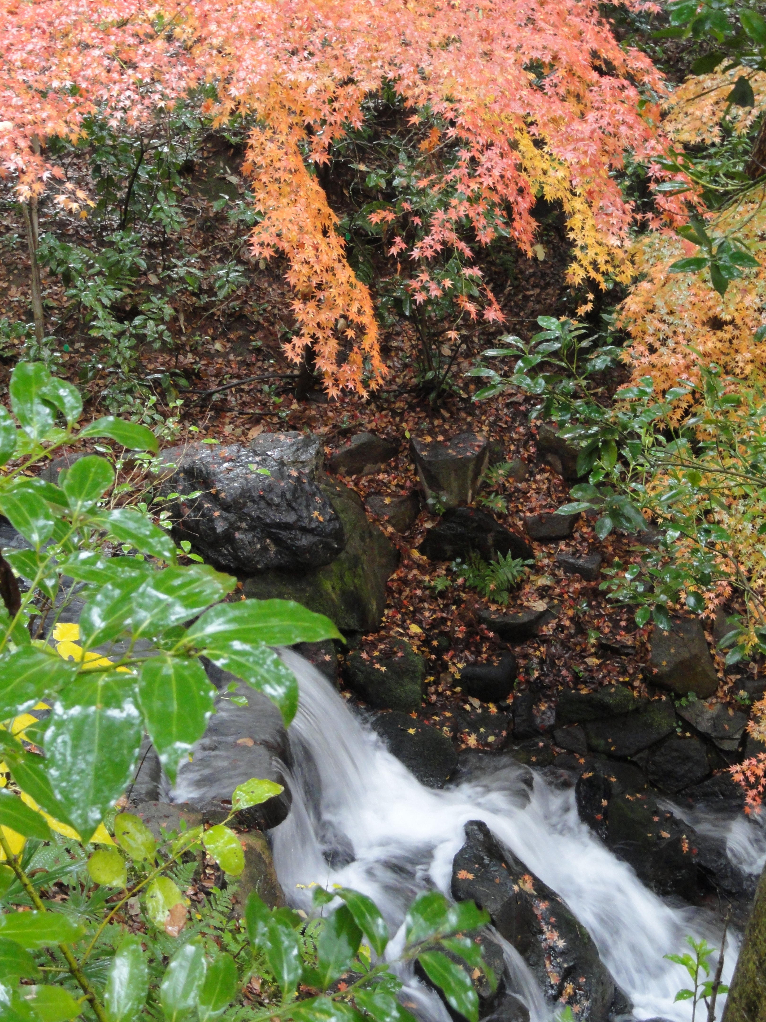 Korakuen, Okayama City, Okayama, Japan.